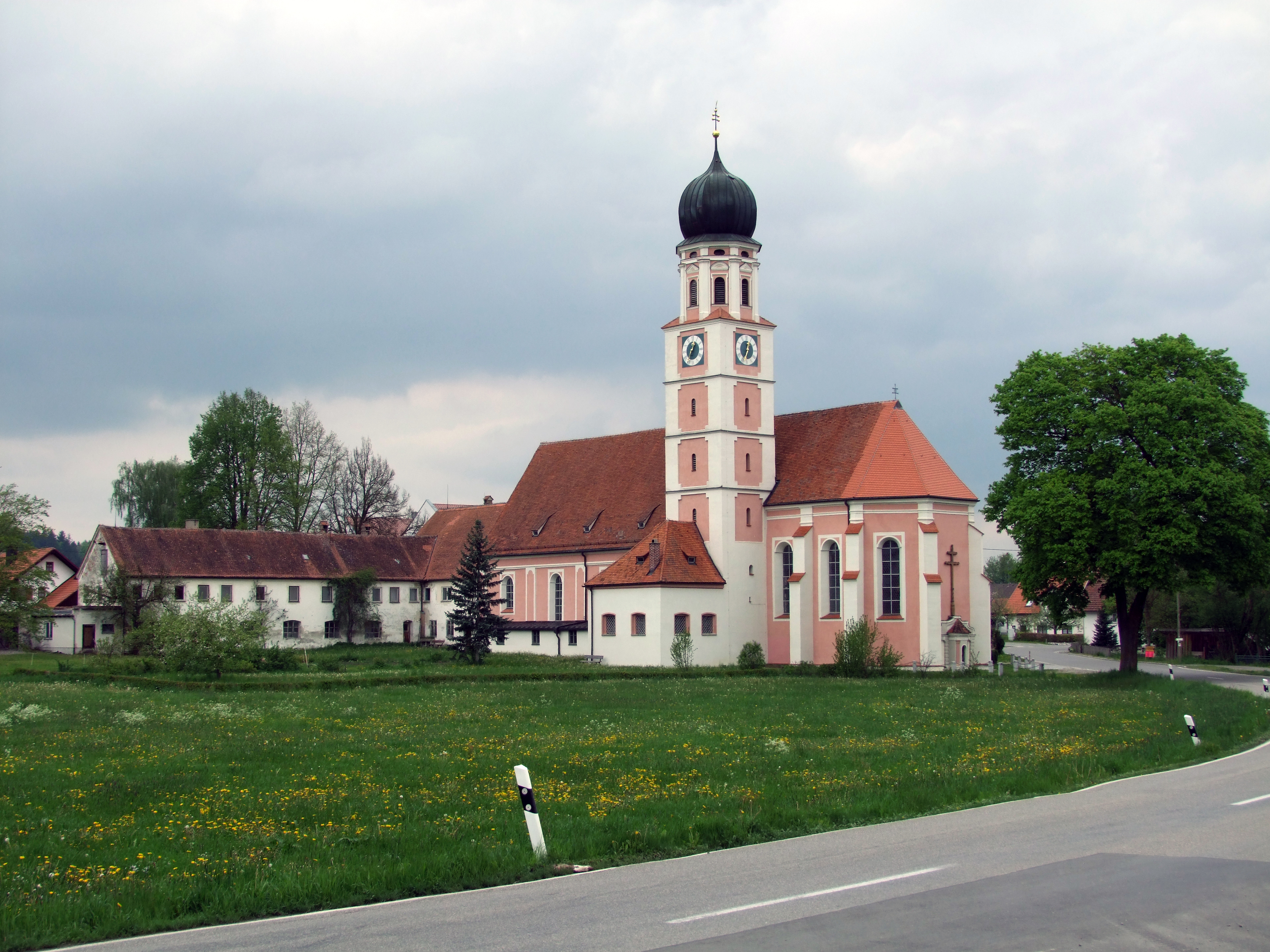 Wallfahrtskirche "Unserer lieben Frau vom Berge Karmel" im oberschwäbischen Mussenhausen, Gemeindeteil Markt Rettenbachs bei Memmingen. Blick von Nordsüd auf die Kirche am Ortseingang